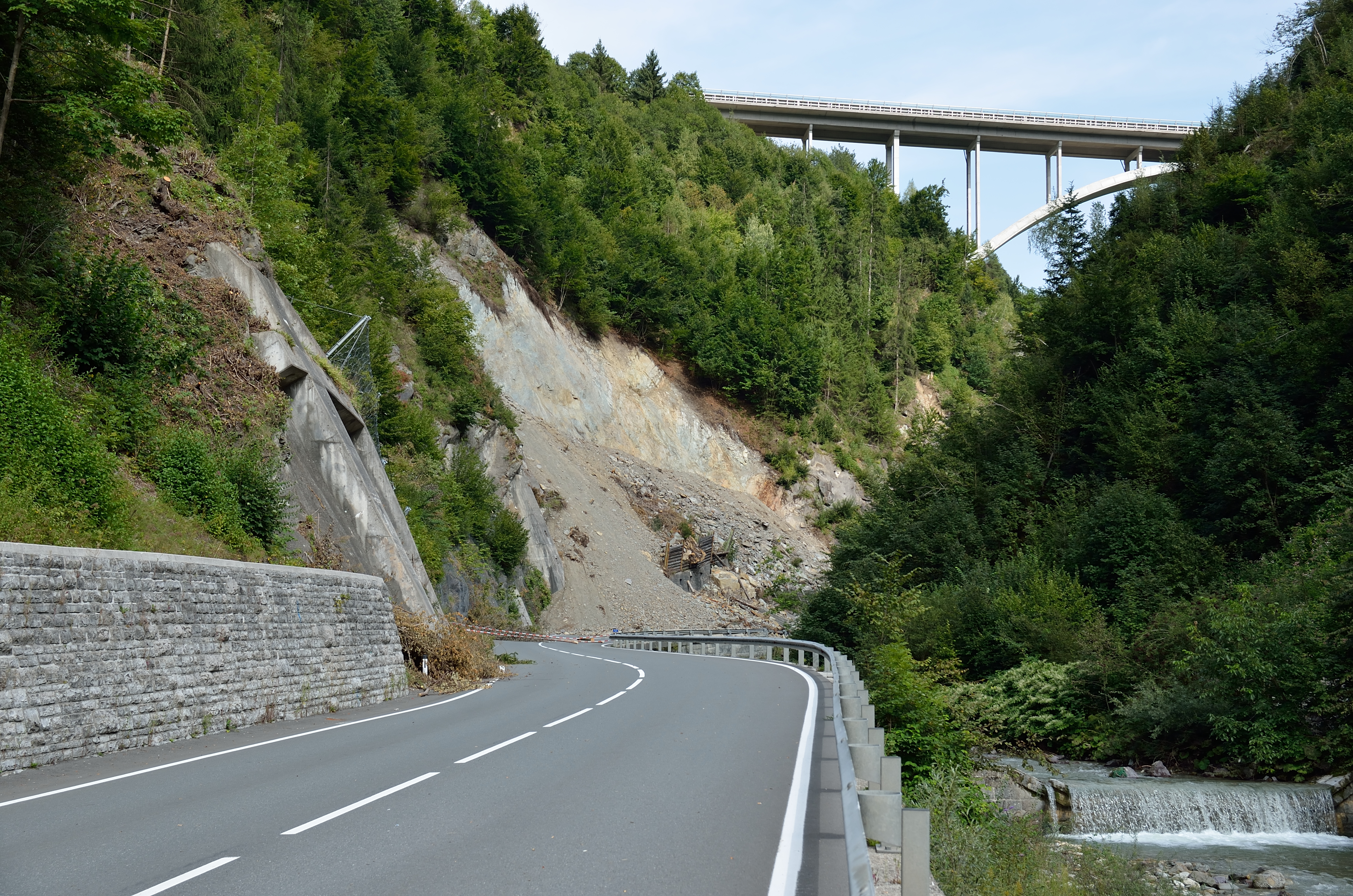 Der Bergsturz am 12. August 2017 an der B 99, Katschberg Straße, im Gemeindegebiet von Pfarrwerfen führte zu einer mehrwöchigen Sperre der B 99. Rechts der Fritzbach, oben die Brücke des Zubringer Pongau zur Tauernautobahn A10 über den Fritzbach. Foto von der Absperrung zur Bergsturzstelle.